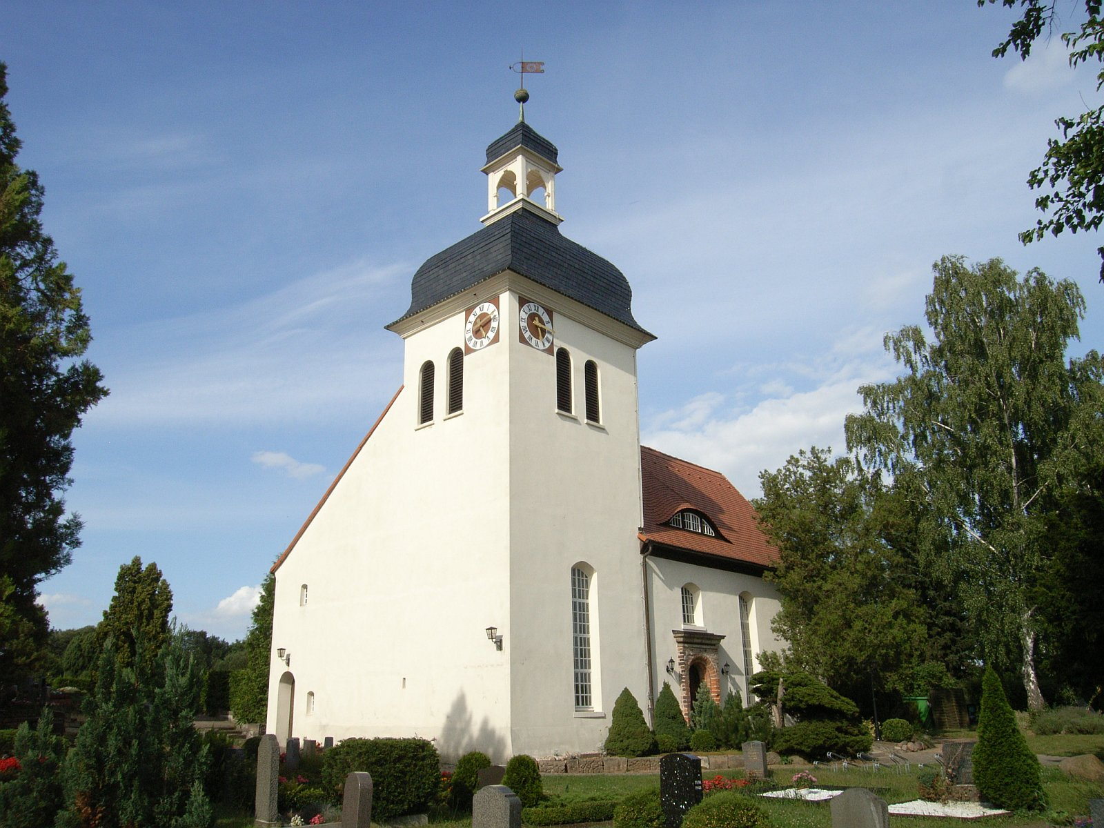 Dessau-Törten,Kirche St. Peter